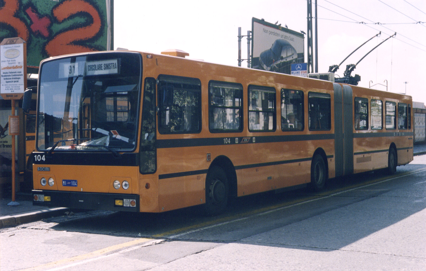 Filobus 104 dell'ATM di Milano in sosta al capolinea di viale Isonzo